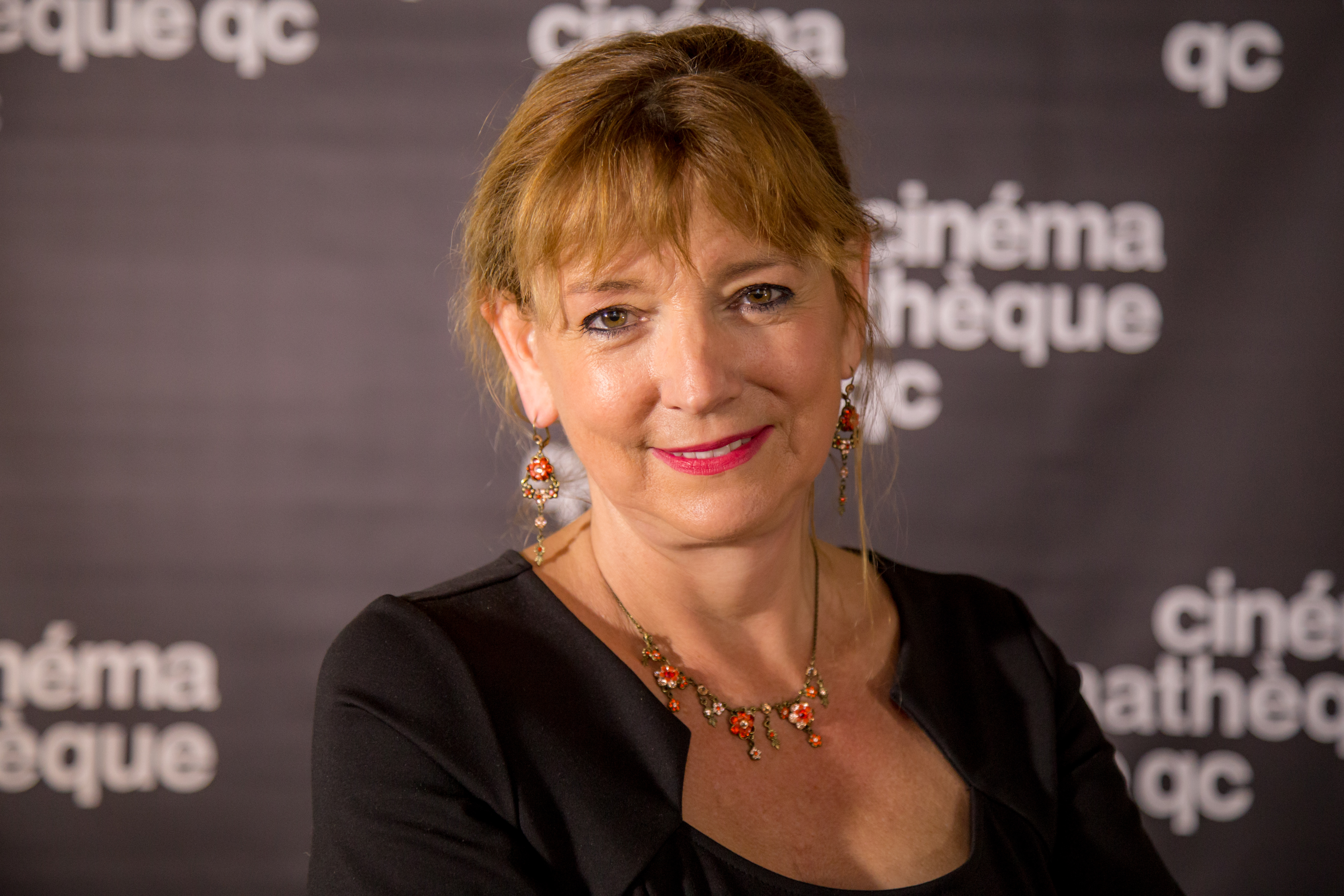 Portrait de la réalisatrice et productrice Marquise Lepage réalisé lors de la soirée d'ouverture du cycle Femmes, Femmes à la Cinémathèque québécoise.